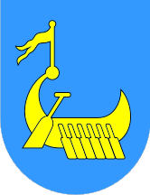 Wappen von Ilirska Bistrica Slowenien